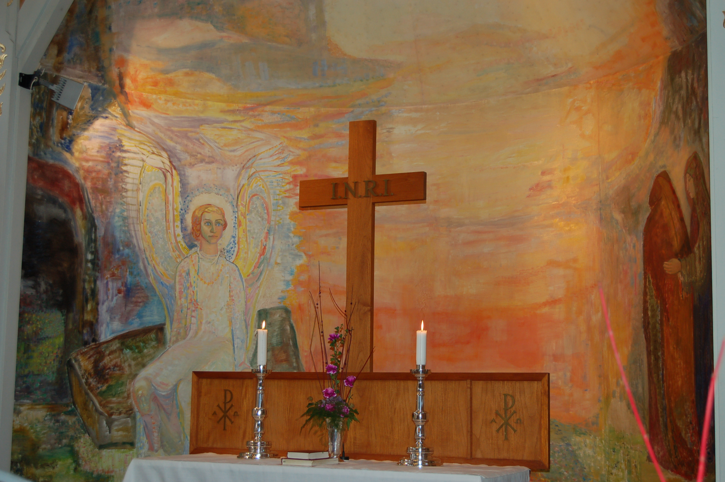 Alteret i Ålgård Kirke